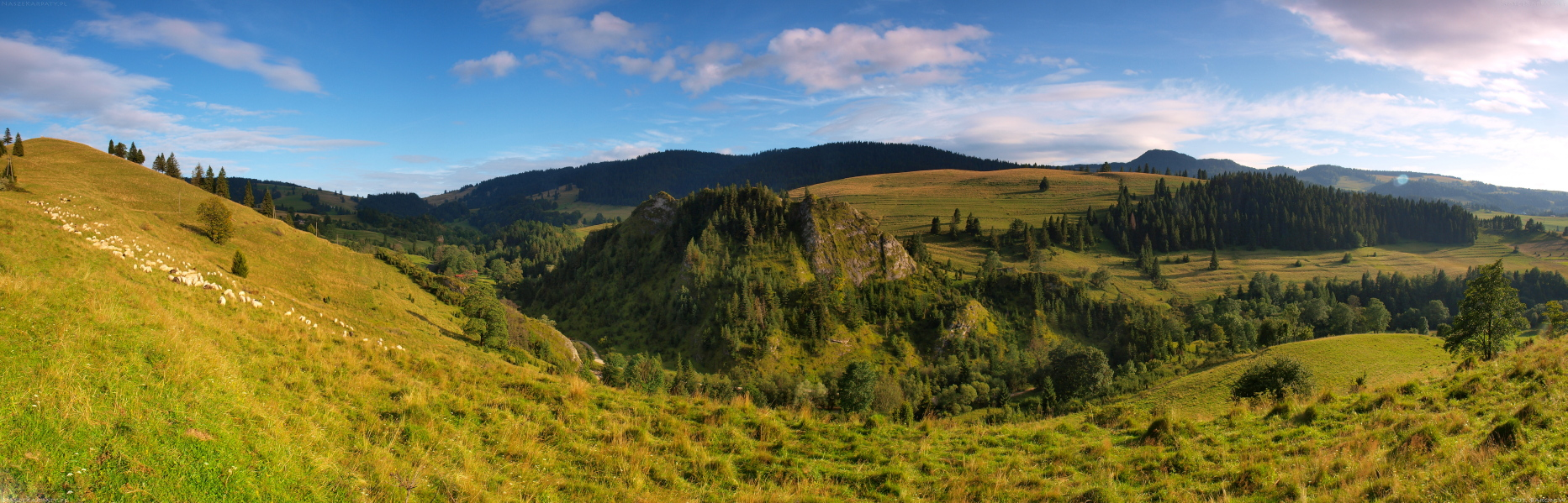 Panorama doliny potoku Biała Woda w Pieninach Małych